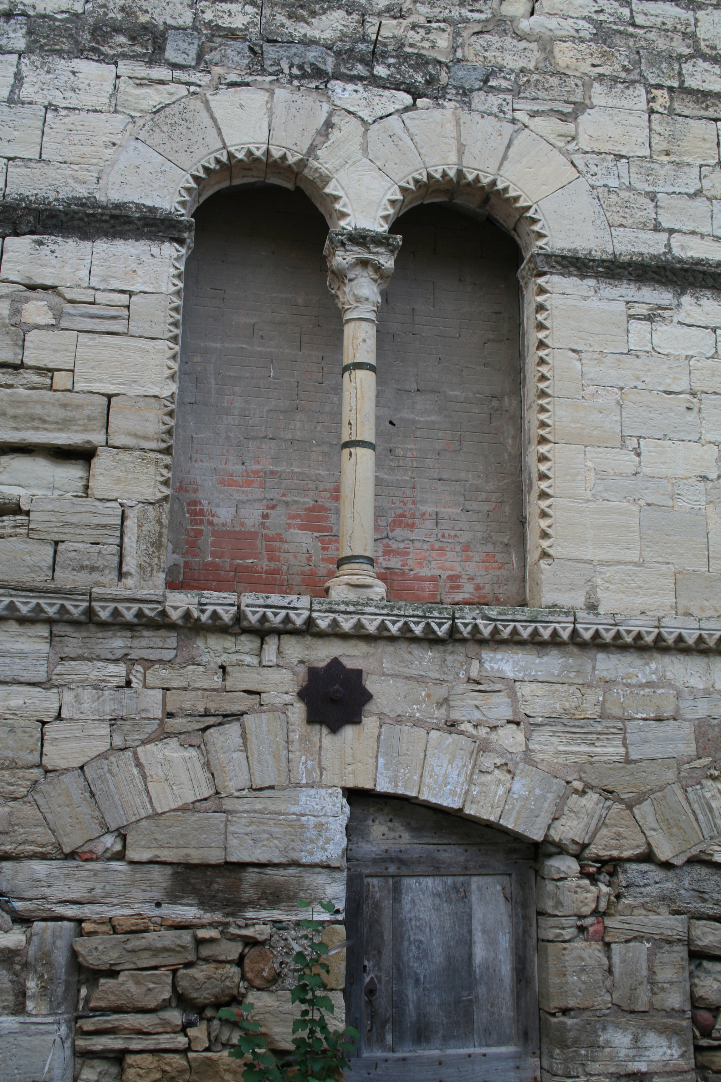 Villemagne-l'Argentière (Hérault) - Maison des Monnaies - fenêtre 1 (avant restauration).